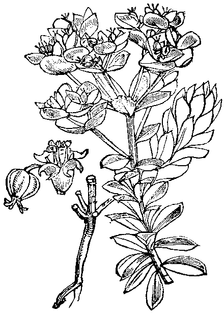 Euphorbia segetalis, Slíka 121. Žitni mleček. (Euphórbia segetális)